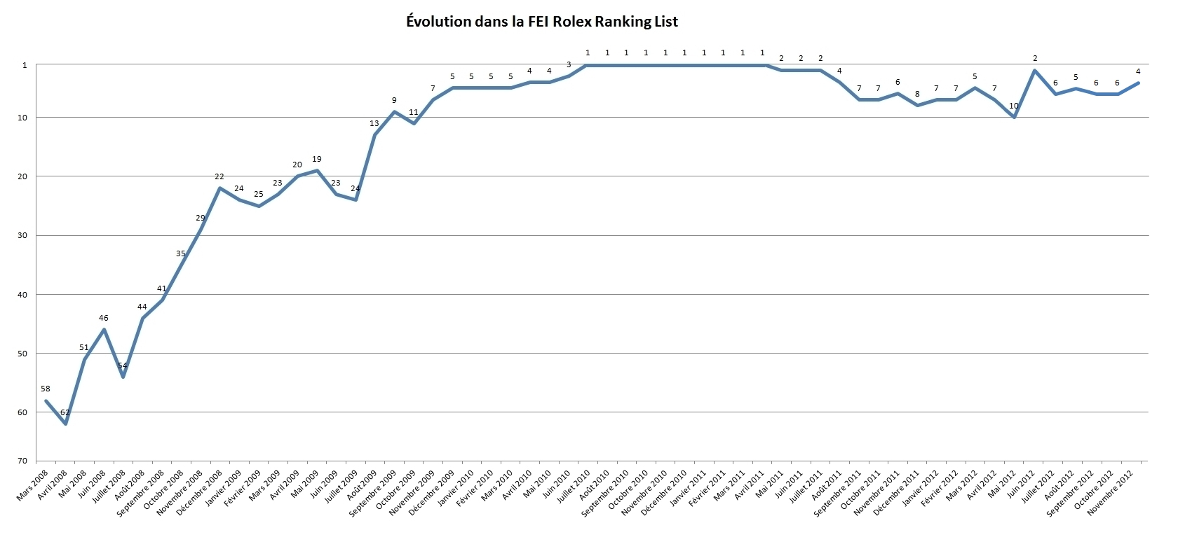 Évolution du classement de Kevin Staut dans la FEI Rolex Ranking List (classement mondial des cavaliers de saut d'obstacles), entre janvier 2008 et novembre 2012.